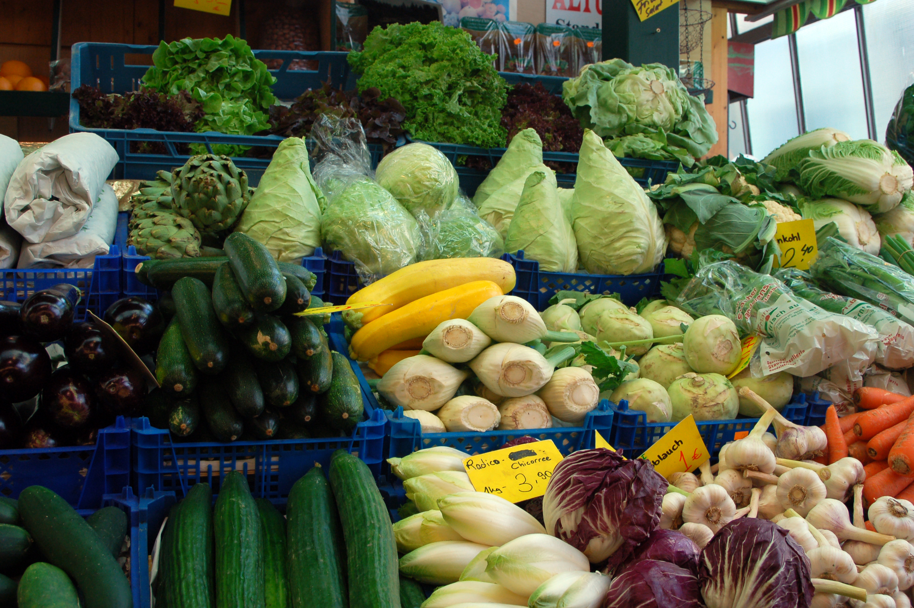 Kleinmarkthalle Frankfurt, Gemüsestand